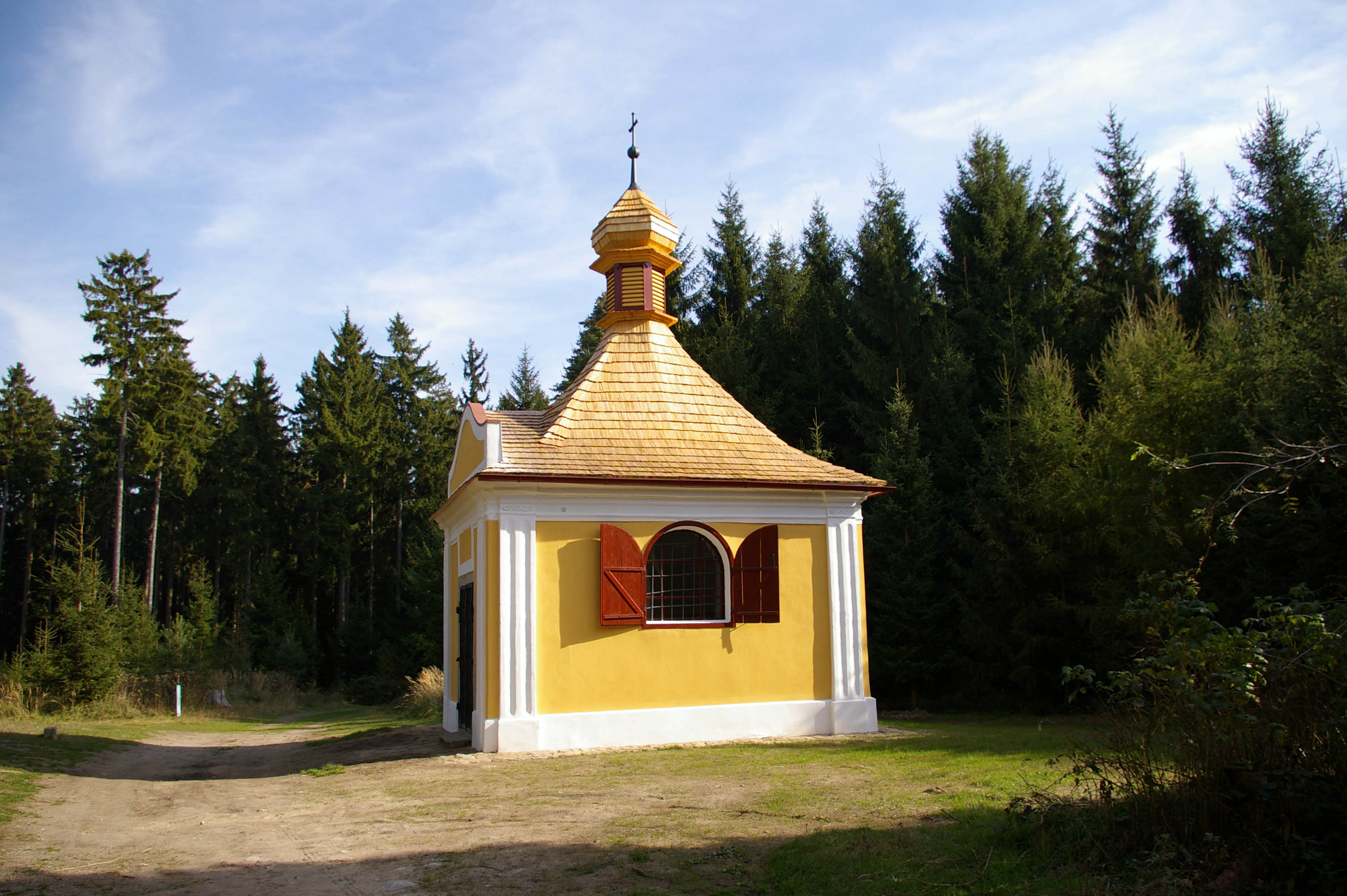 Kaple svatého Anonína u obce Rounek (Jihlava)